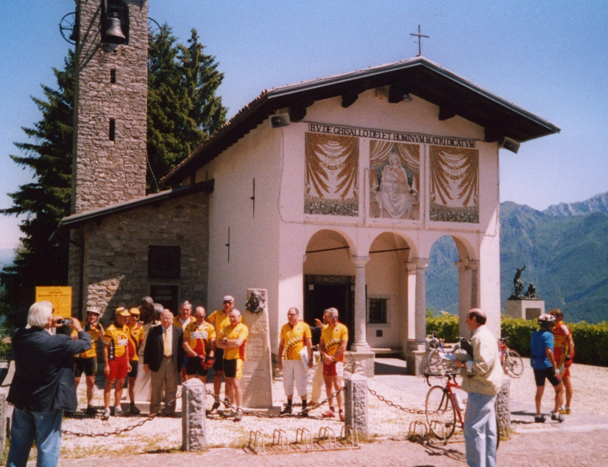 Description : Photo prise lors d'une visite des cyclotouristes français du Vélo Sportif Villecresnois à la Chapelle Madonna del Ghisallo en juin 2005 Auteur : Daniel Le Roy